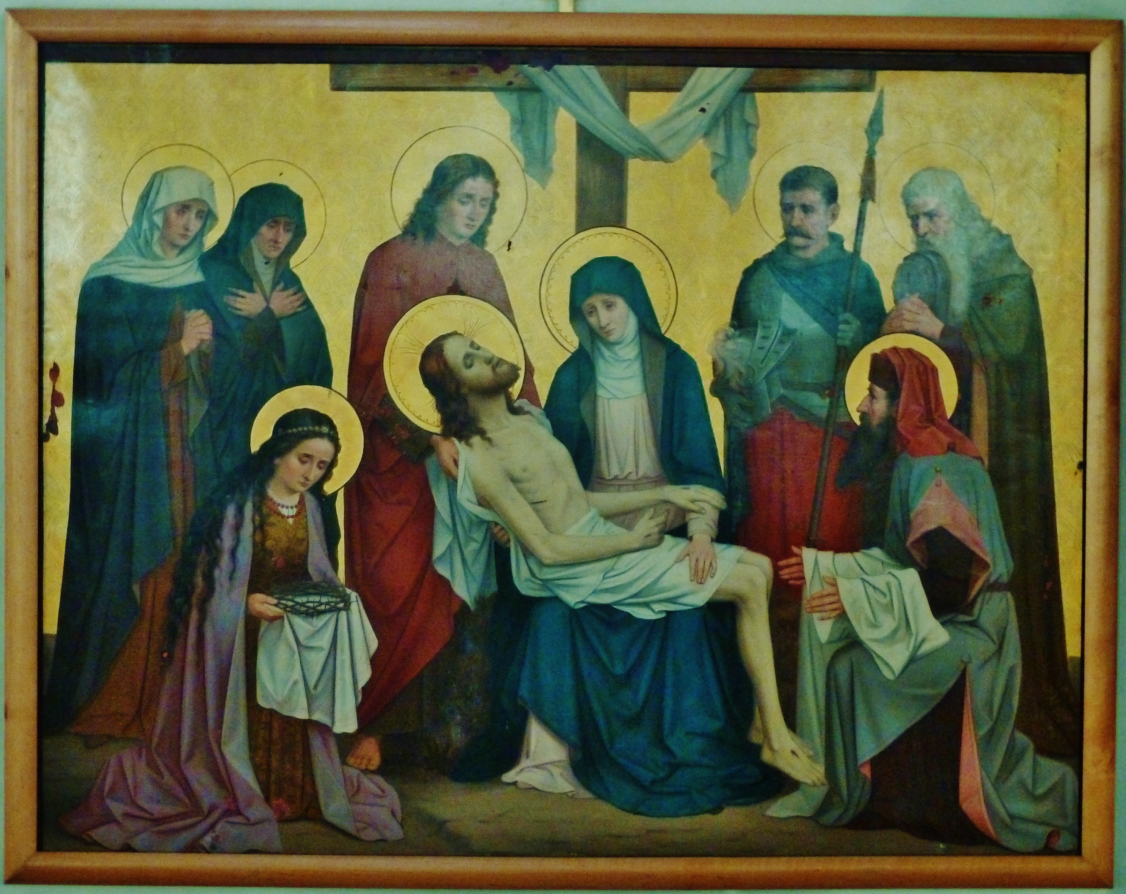 Kreuzwegstation in der St. Petrus Kirche in Gesmold (1897)